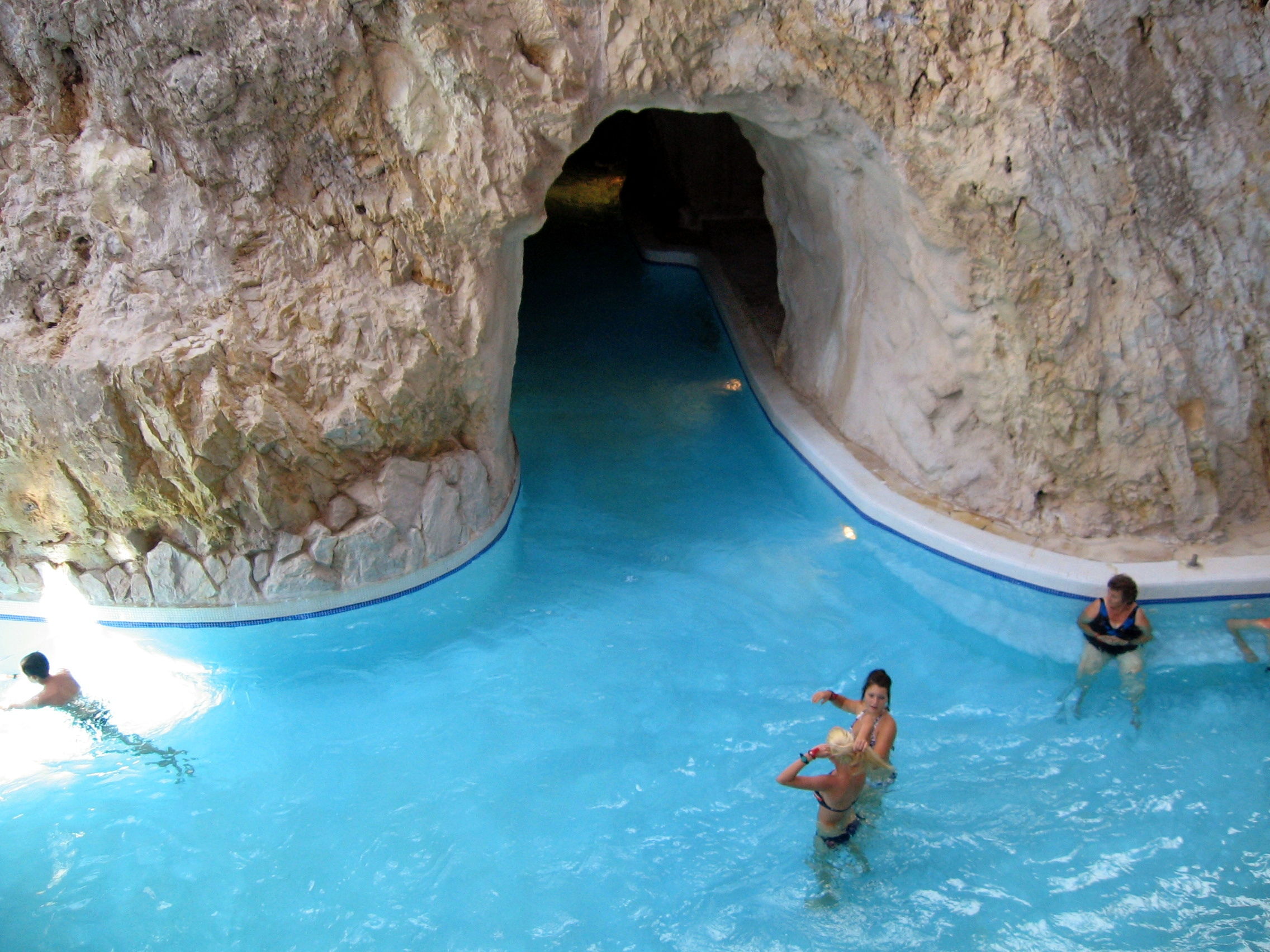 Miskolctapolca Bath. Пещерные термальные купальни